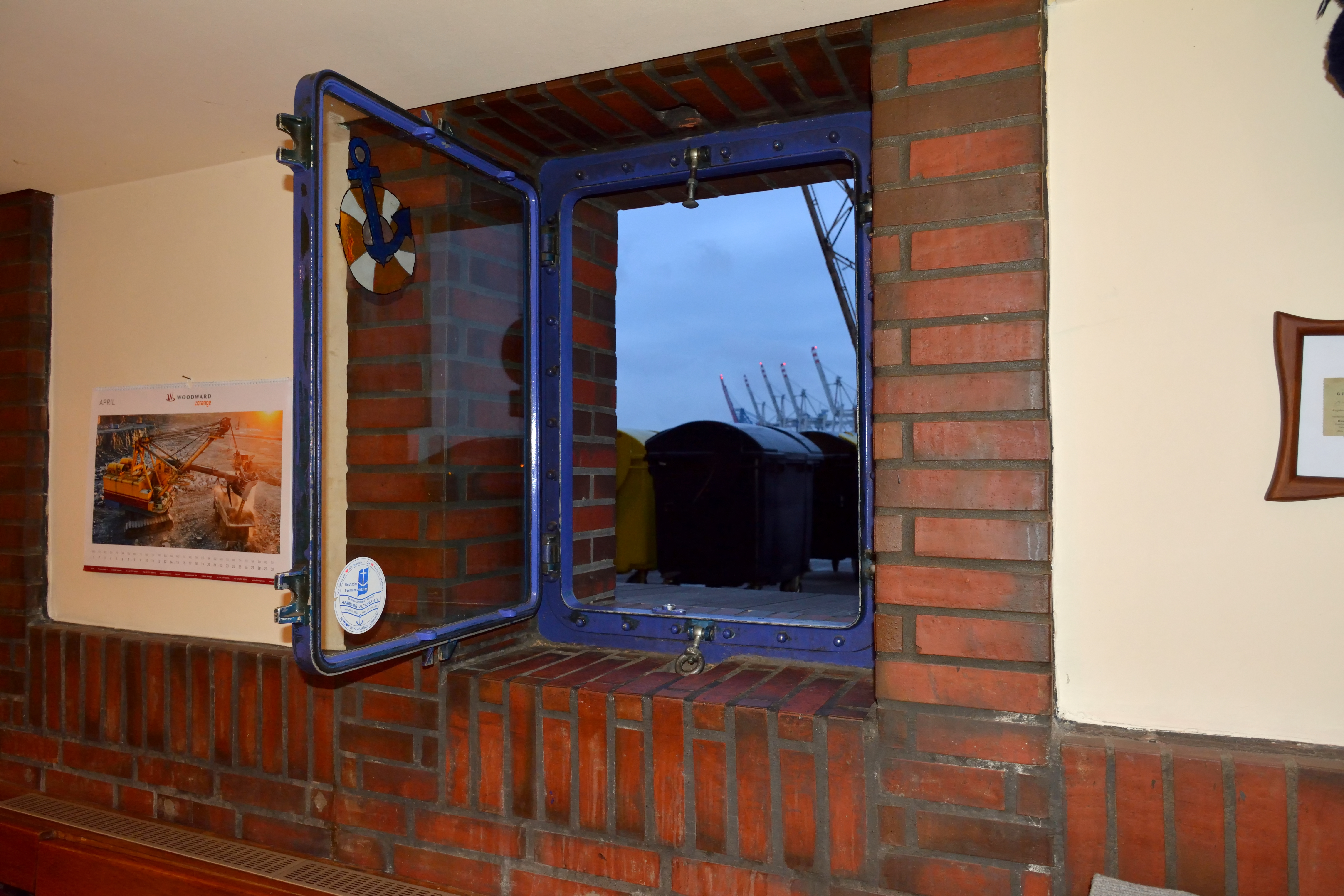 Impressionen eines Wochenendes in Hamburg mit dem Titel: Wikipedia:AhoiFlutschutz an der Semannsmission in Hamburg-Altona. Die Fenster bestehen aus Panzerglas.